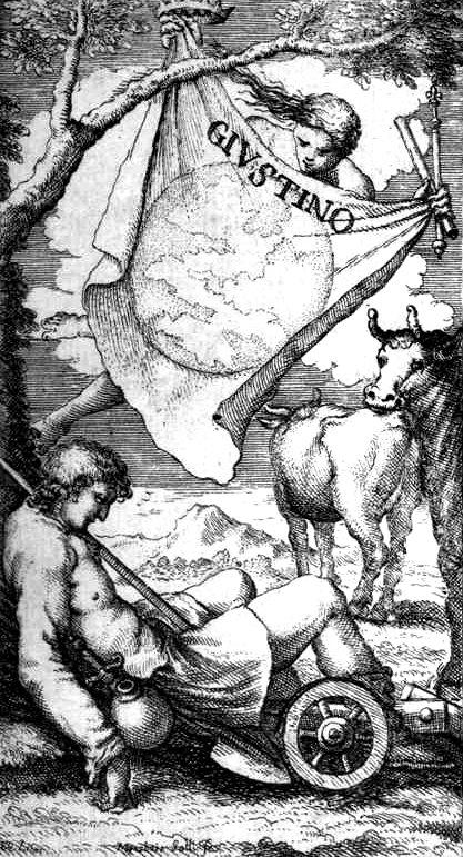 Giovanni Legrenzi - Giustino - image from the libretto, Venice 1683